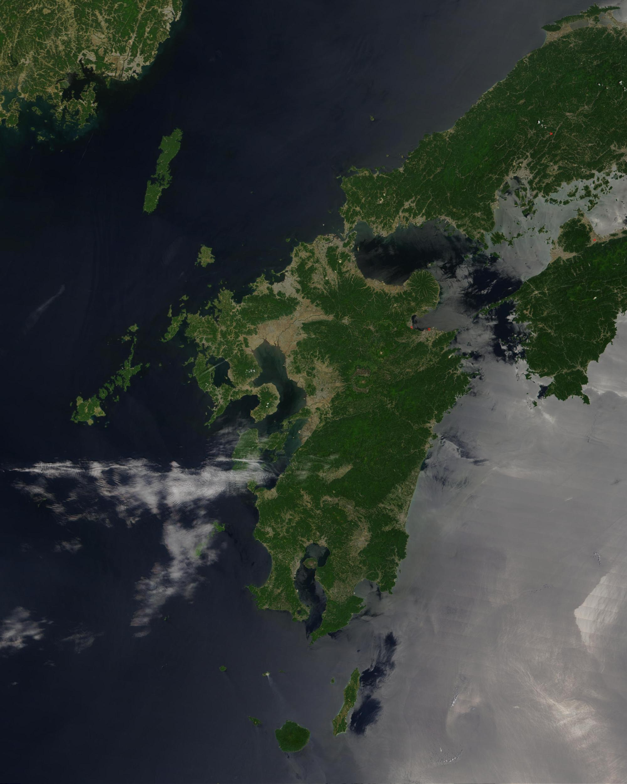 九州周辺の衛星画像、Terra(MODIS)2002年5月25日撮影